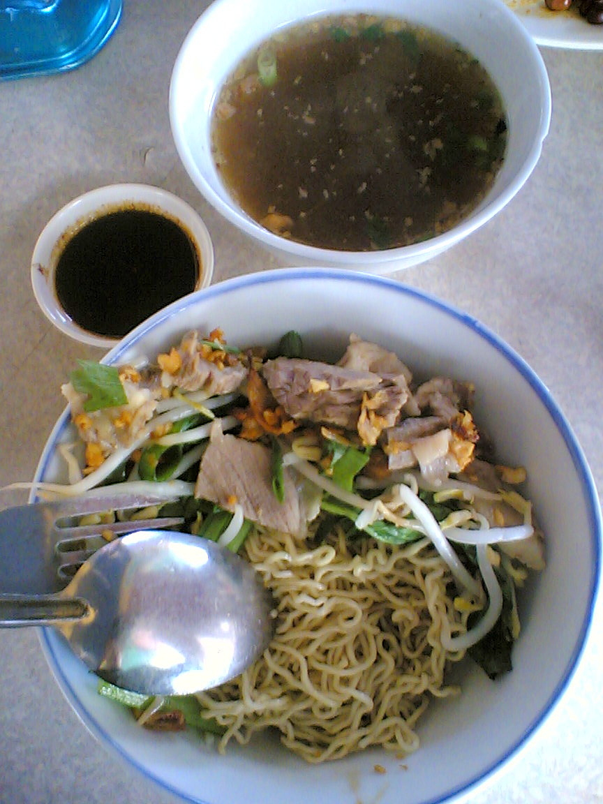 mi kolok di sarawak